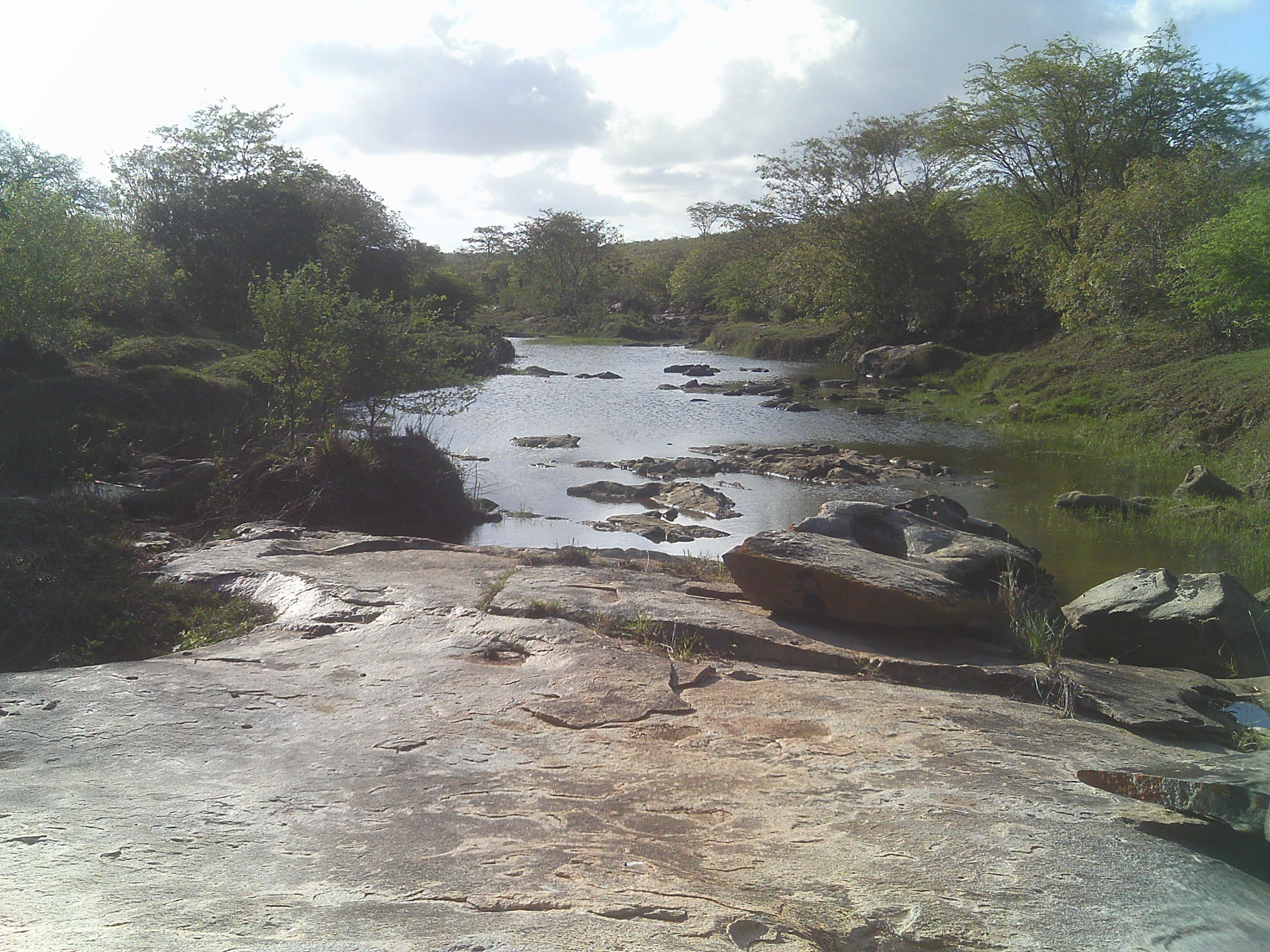 Trecho do Riacho Capivara, na divisa entre Glória e Monte Alegre. Nota-se, no leito do rio, o afloramento rochoso, típico da região. Diferente do que se vê na foto, no período chuvoso as águas fluviais inundam vasta área da paisagem. Deságua no Rio São Francisco, nas proximidades do Povoado Ilha do Ouro, município de Porto da Folha.